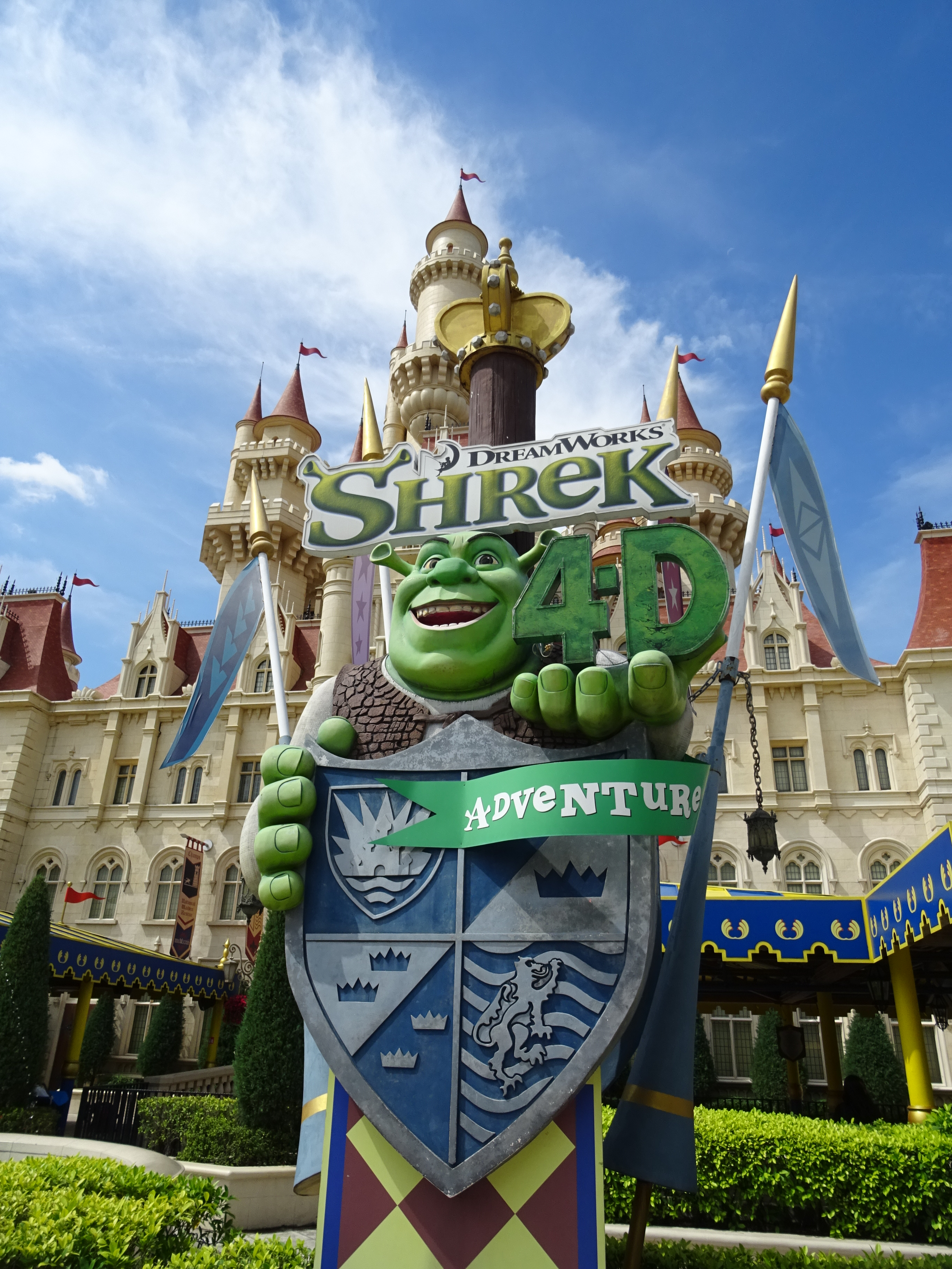 Entrée de Shrek 4-D